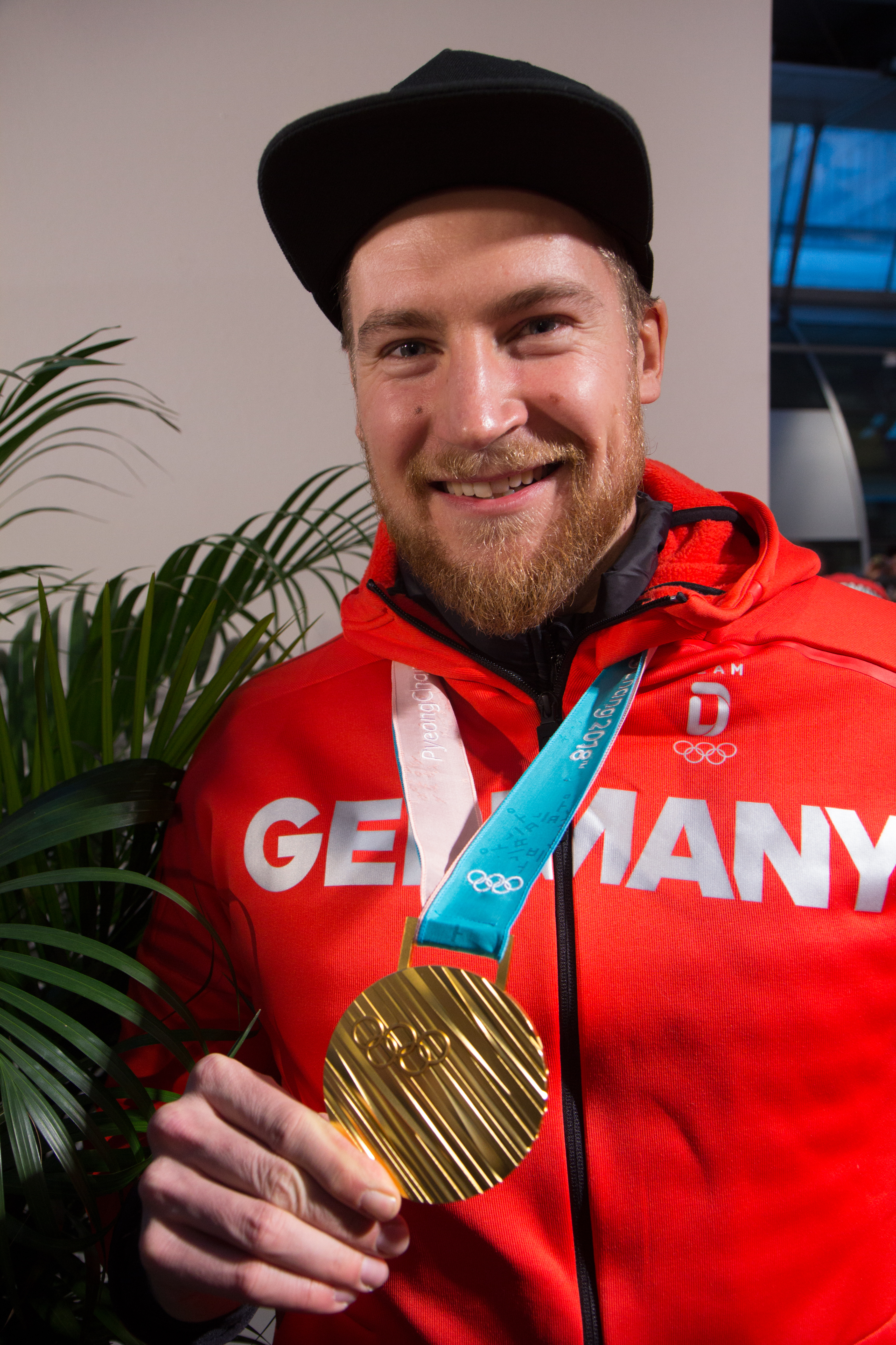 Ankunft der deutschen Olympiamannschaft am 26. Februar 2018 mit Flug LH713 auf dem Frankfurter Flughafen.